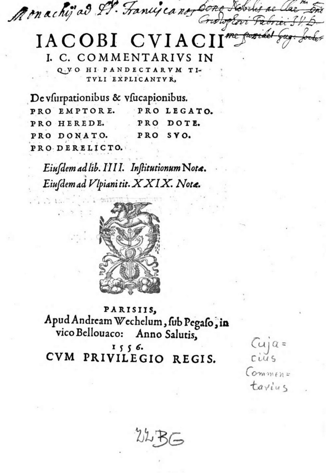 Portada de l'obra "Commentarius in quo hi pandectarum tituli explicantur. Eiusdem ad titulos IIII Institutionum Notae. Eiudem ad Ulpiani titulos XXIX Notae" de Jacques Cujas. Parisiis (París): Apud Andream Wechelum, 1556.